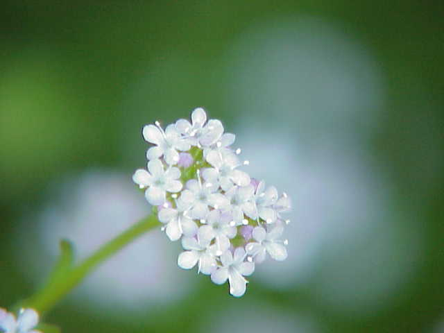 Species: Valerianella coronata Family: Valerianaceae Image No. 1